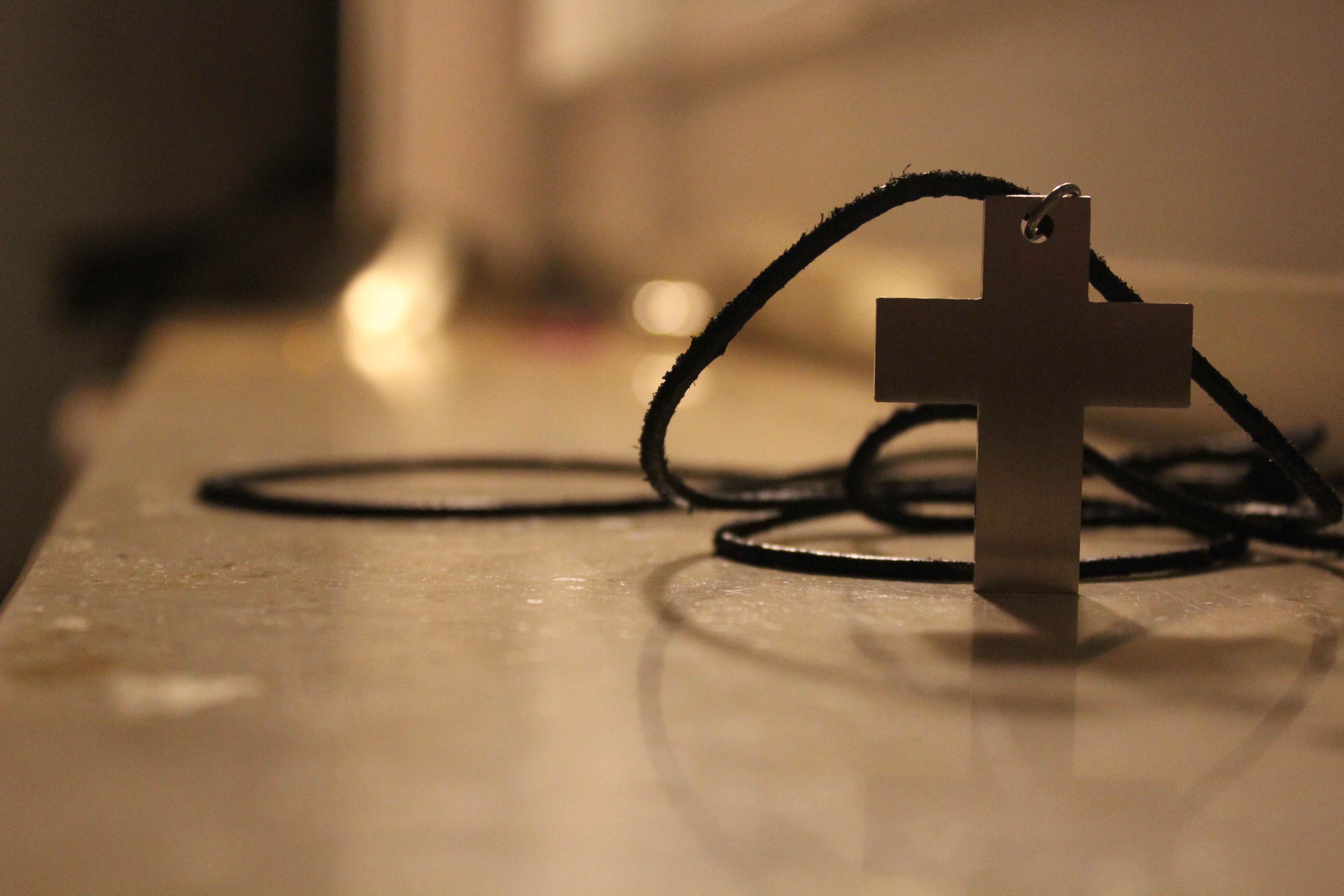 Edelstahlkreuz am Halsband